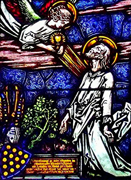 Chorfensterzyklus Marsow, Künstler Fritz Geiges 1911